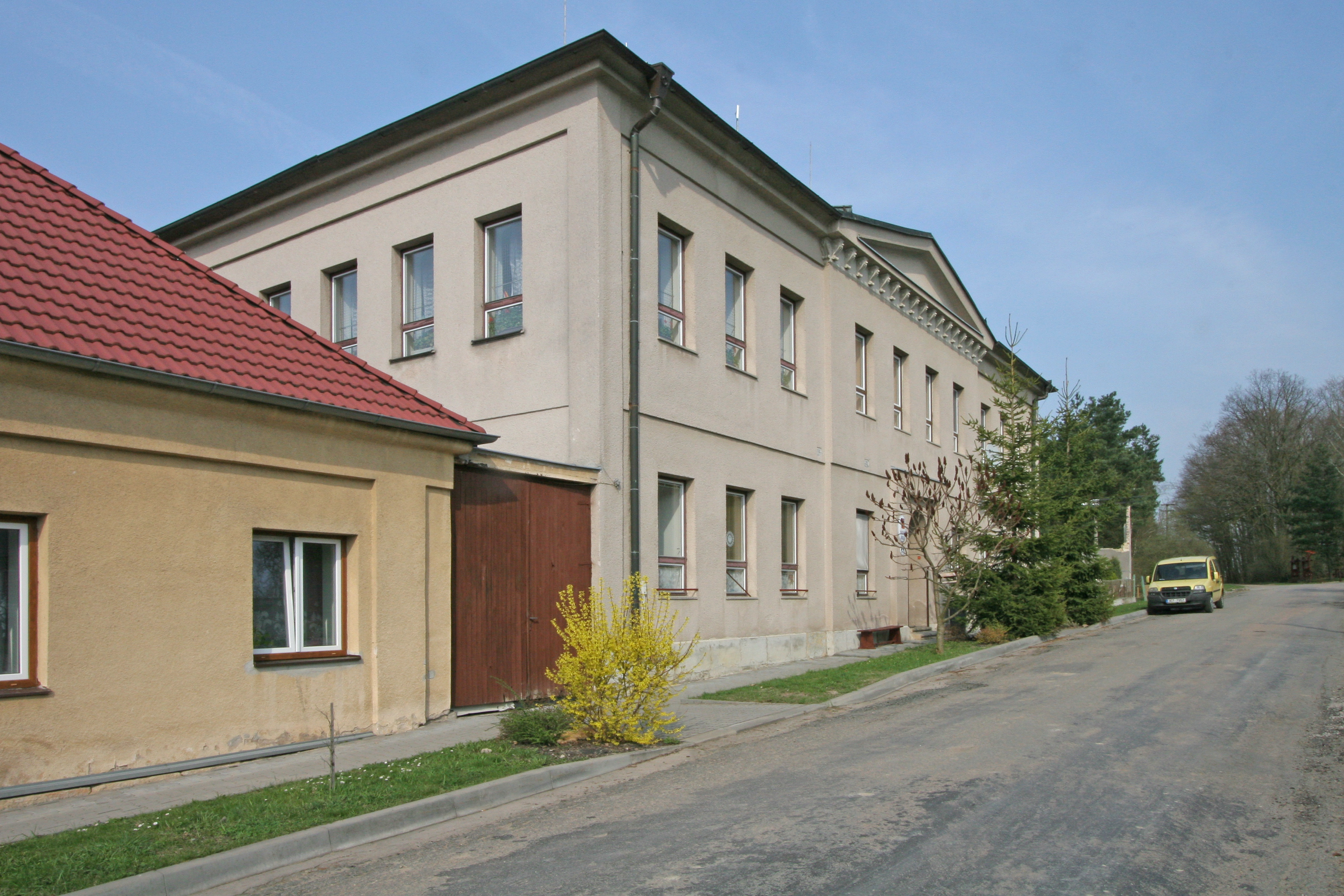 Vápno škola